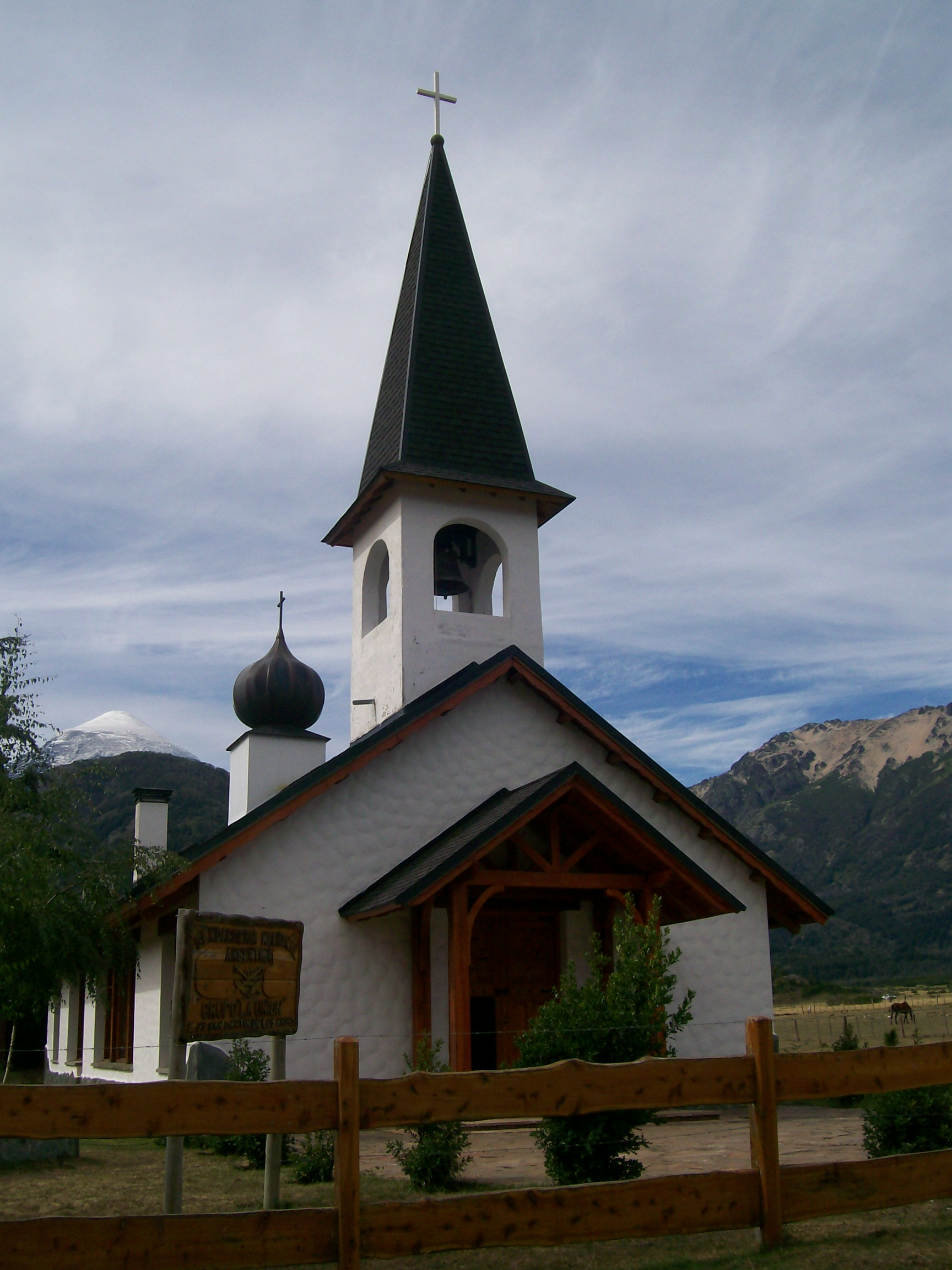 Iglesia Maria Auxiliadora del Paimun, a orillas del lago Paimun, PN Lanin, Neuquen